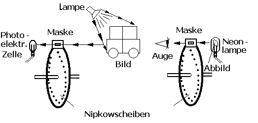 Elektrisches Teleskop